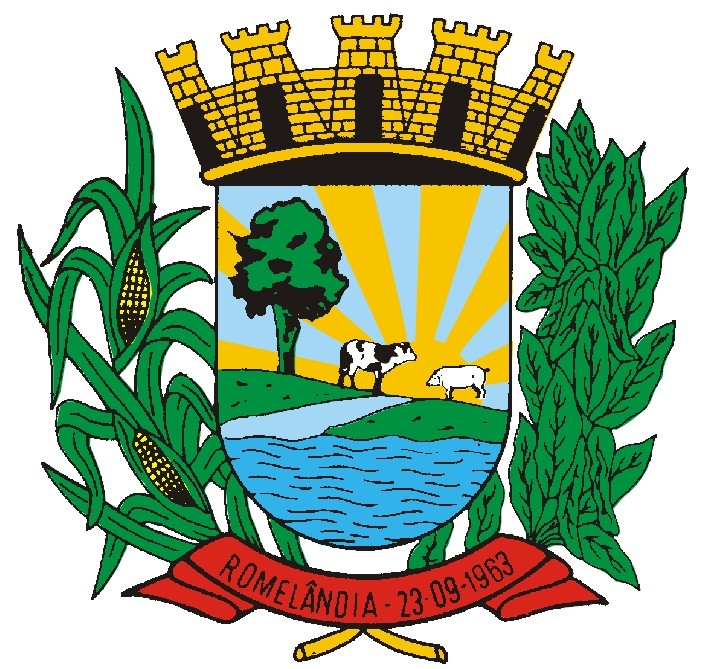 Blason de la municipalité de Romelândia - Brésil